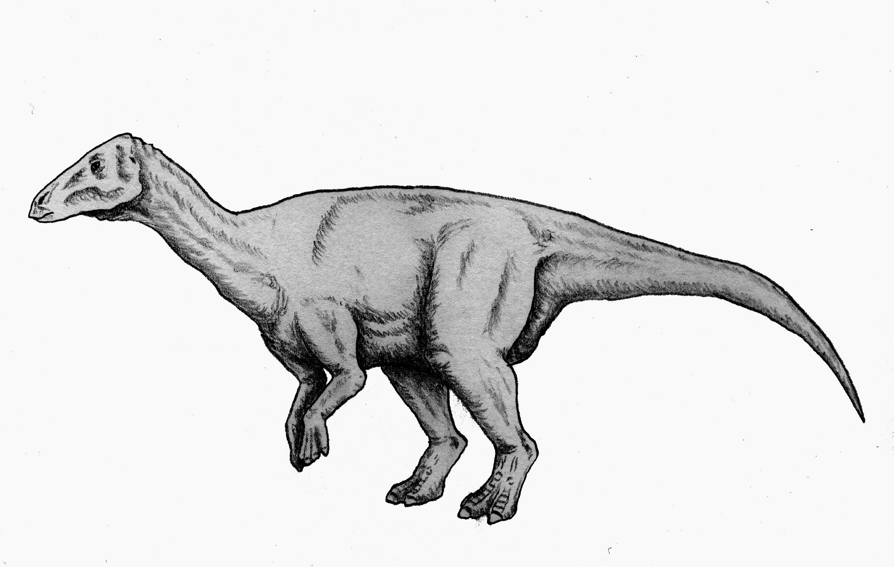 Telmatosaurus, a primitive hadrosaurid ornithopod